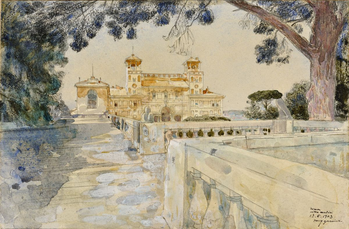 Tony Garnier, vue de Rome, avec la villa Médicis.